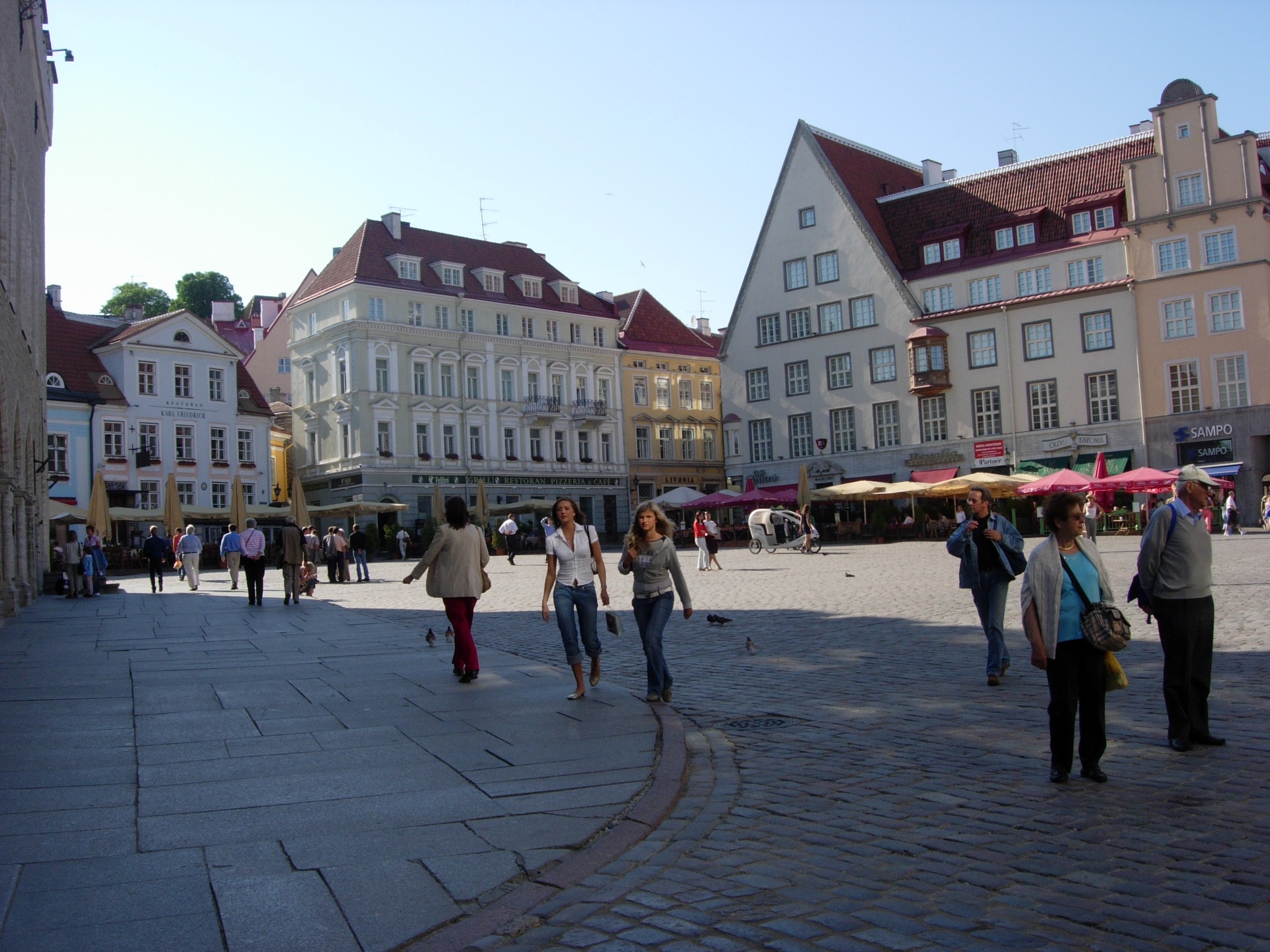 Raekoja plats in Tallinn Old Town